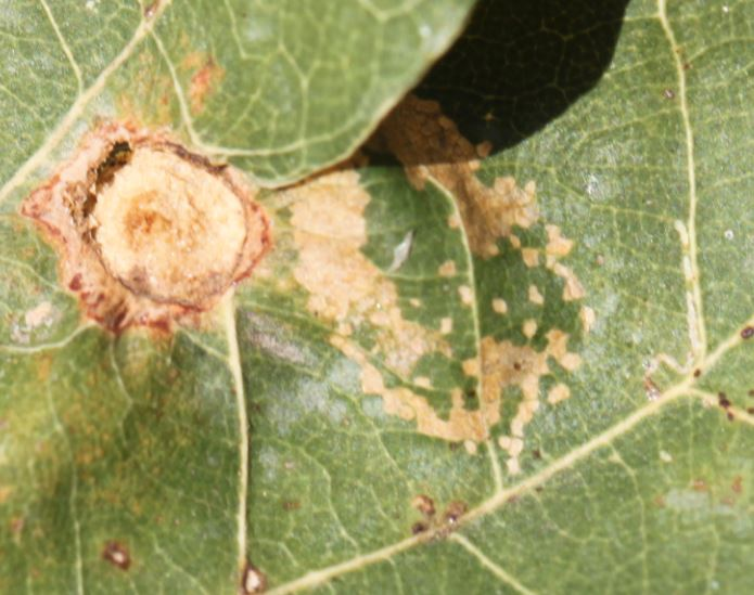 Mine von Phyllonorycter quercifoliella an Stieleichenblatt, Blattoberseite, Mitte September 2019; links daneben eine Galle